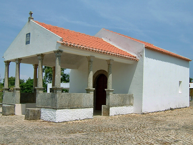 Capela do Senhor do Calvário - Proença-a-Velha